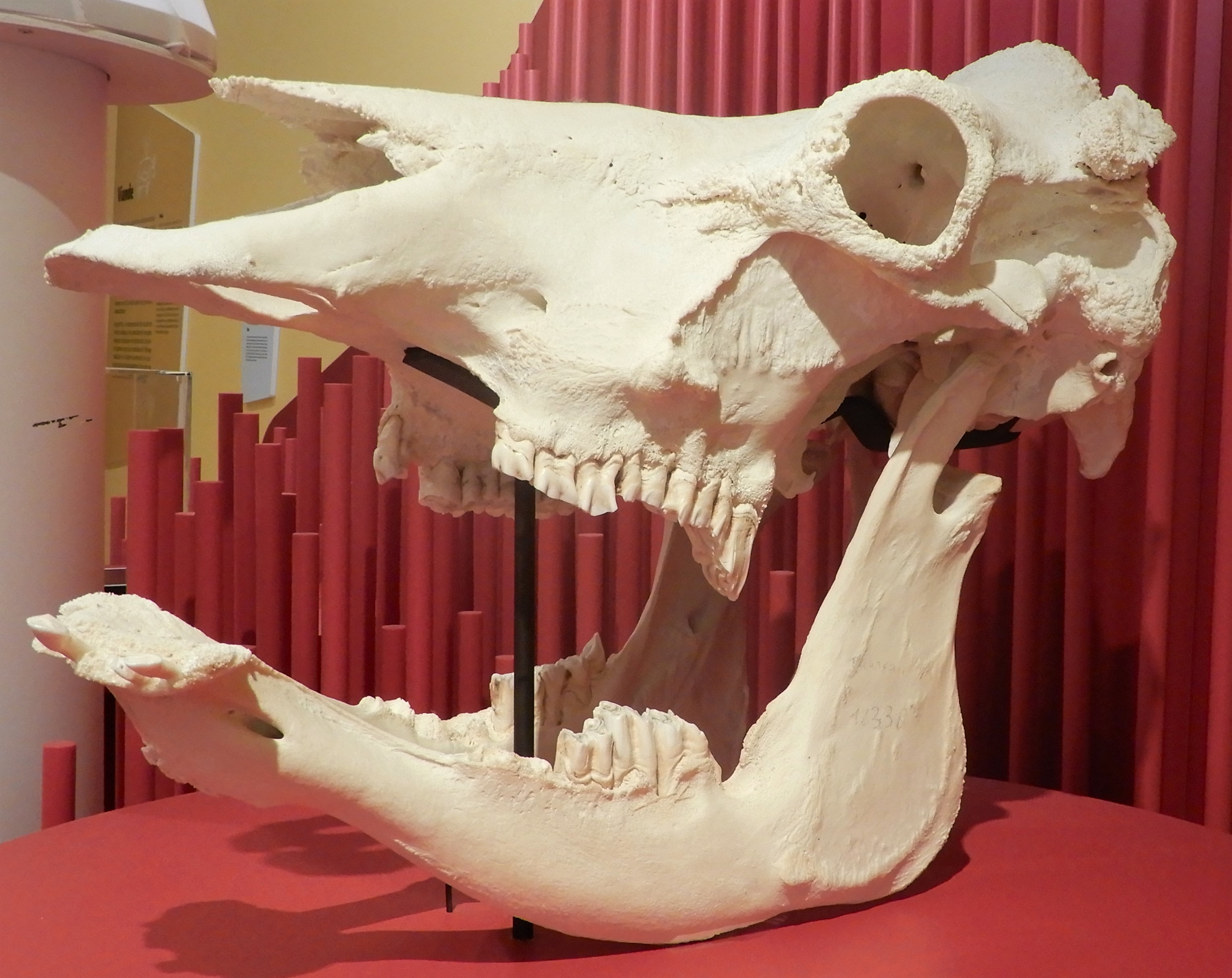 Crâne du taureau Jocko-Besné exposé au Musée de l'Homme dans le cadre de l'exposition Je mange donc je suis en 2020.